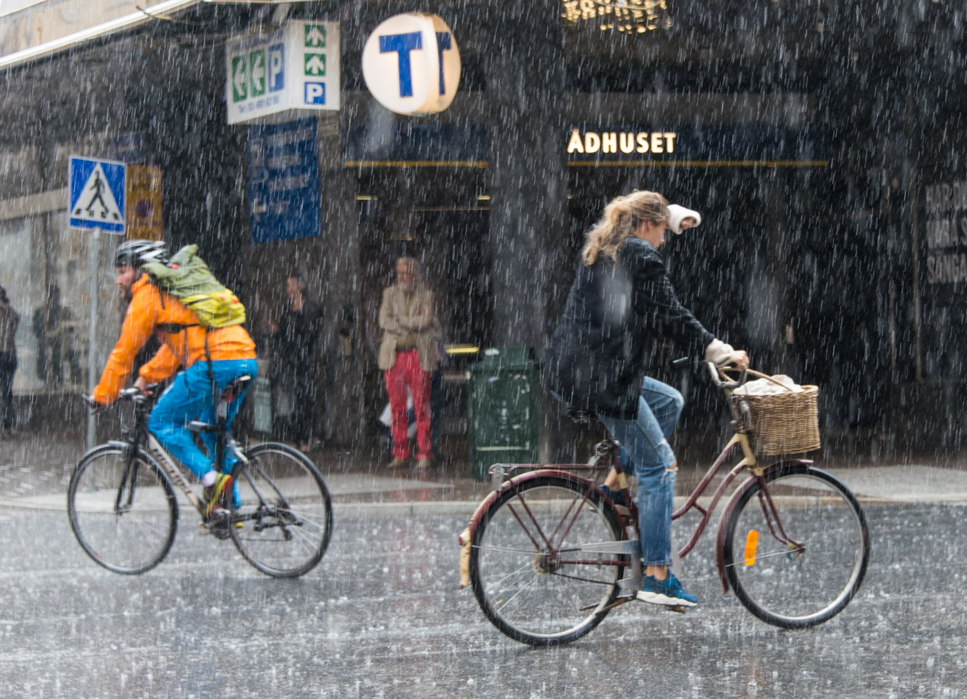 Störtskur i Stockholm den 29 juli 2015. Hörnet Kungsholmsgatan - Pipersgatan på Kungsholmen.